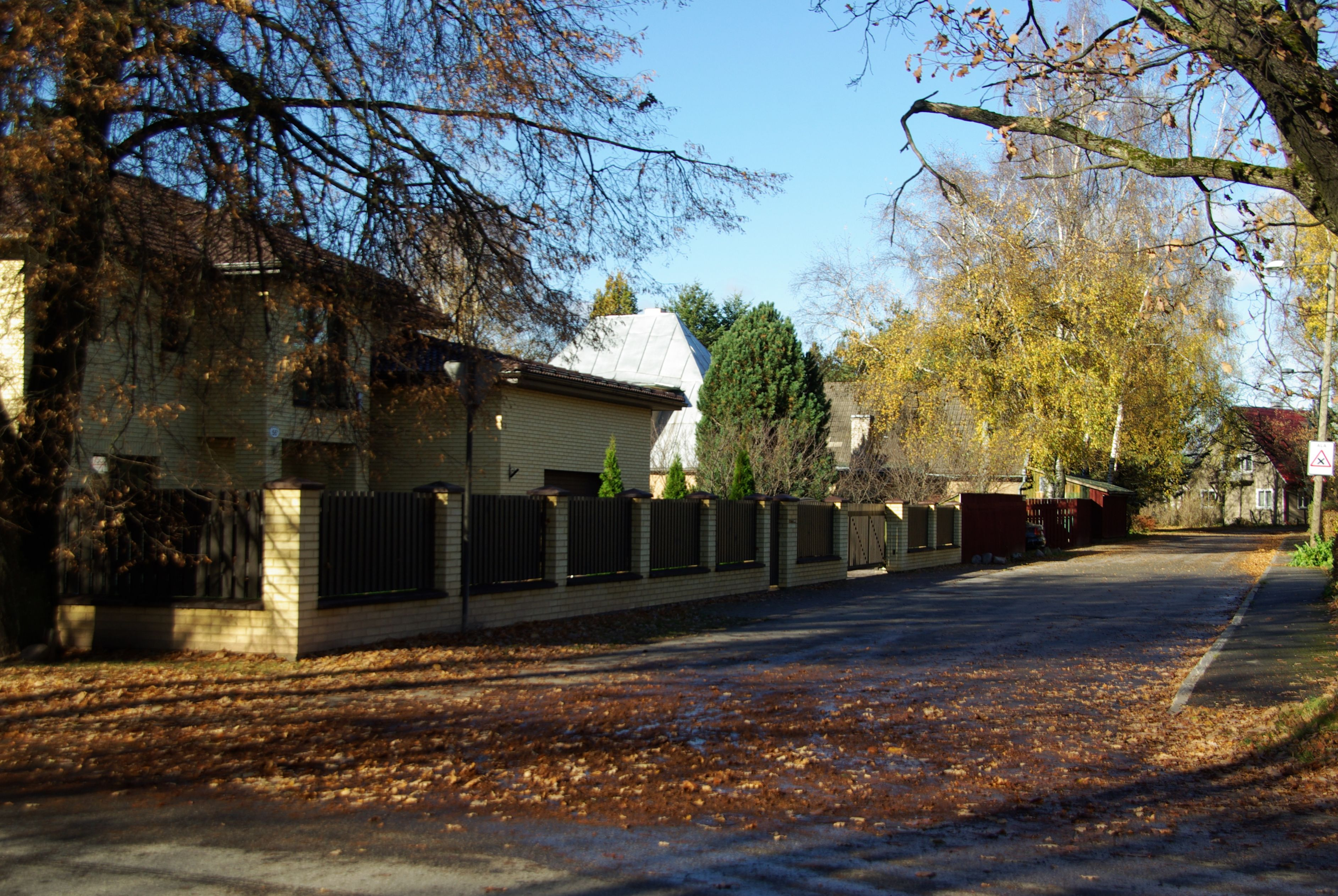 tänav Tartus Tammelinnas